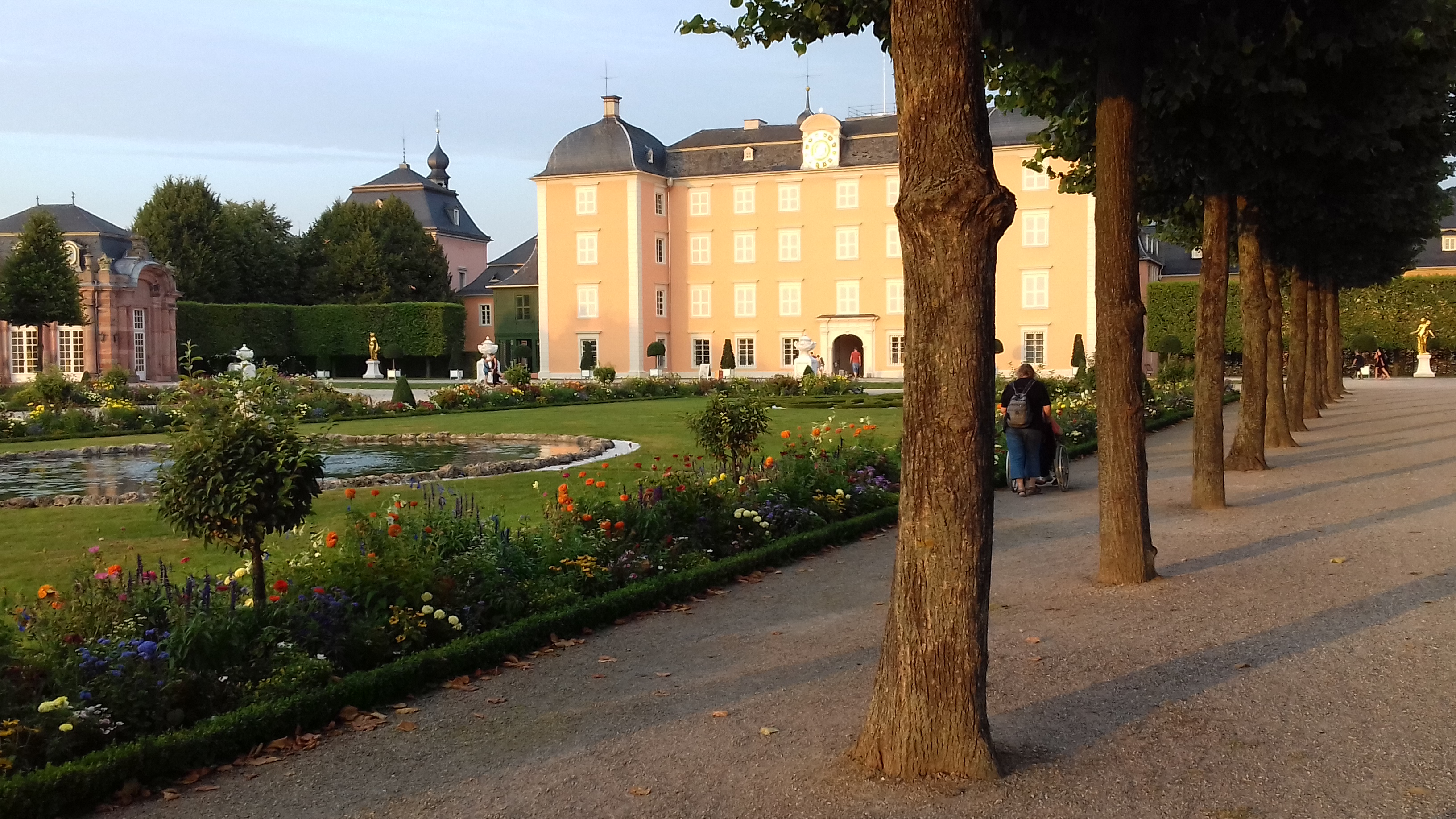 Schwetzinger Schloß von der Gartenseite